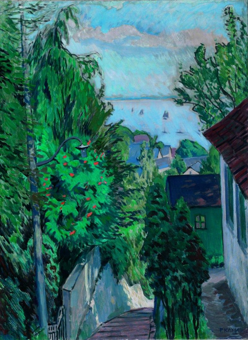 Treppenviertel in Blankenese, um 1920, Öl auf Leinwand, 80 x 60,5 cm